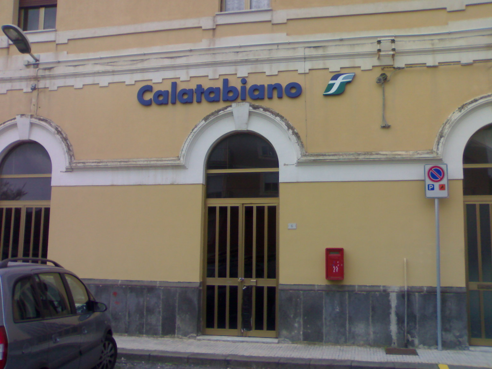 Particolare della stazione di Calatabiano, Calatabiano, Sicilia, Italia.